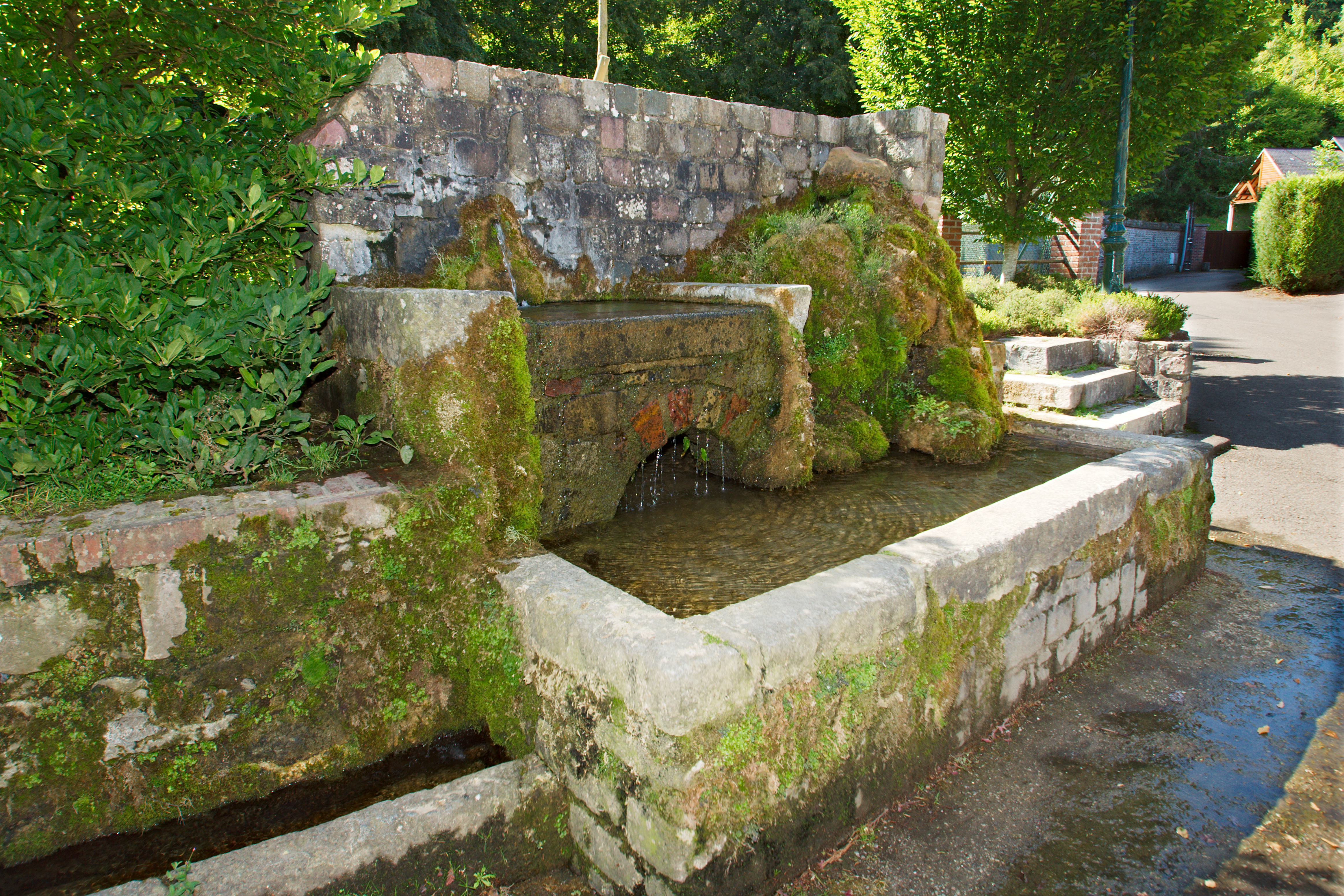 Fontaine de la source du Robec route de la Fontaine à Fontaine-sous-Préaux